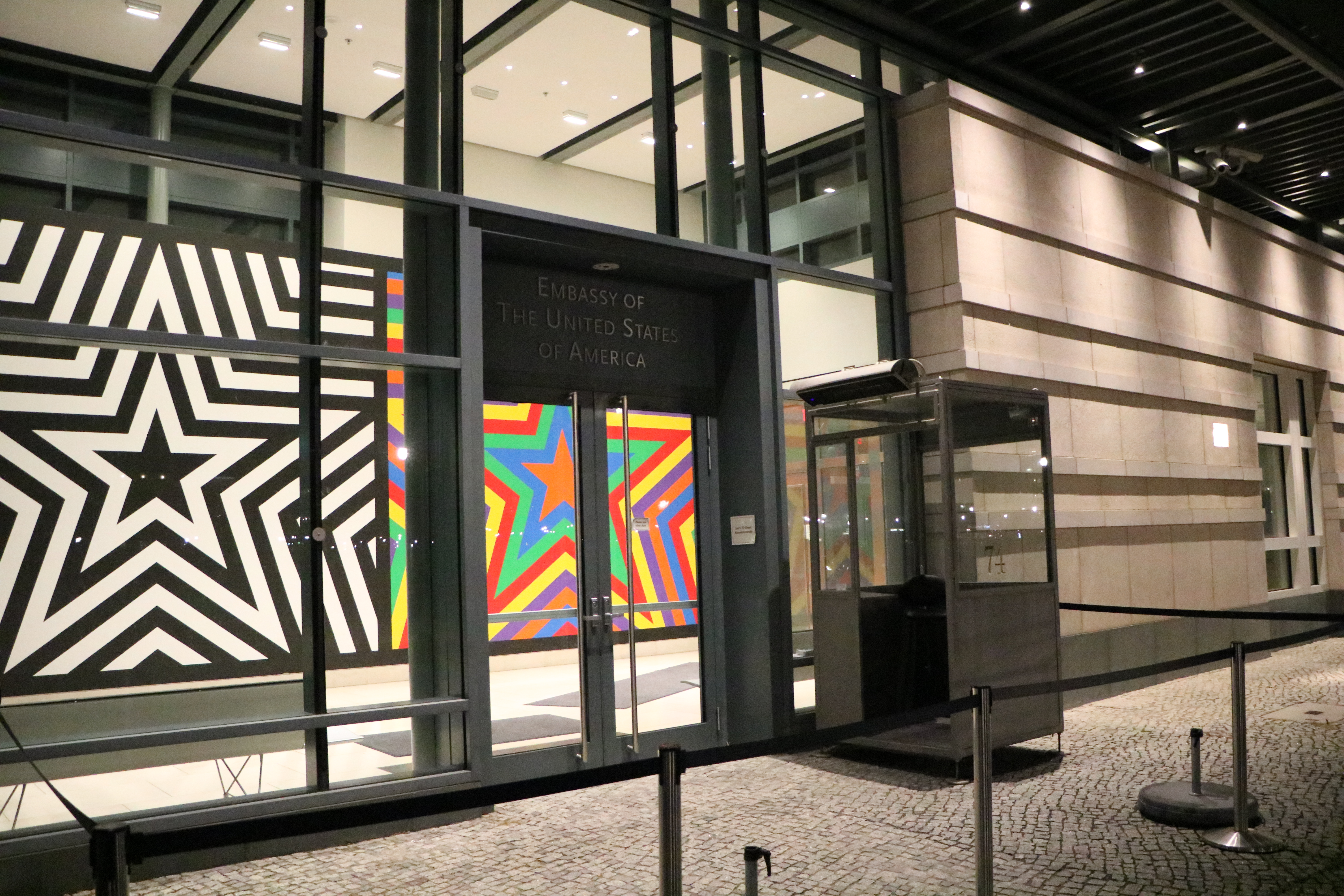 Eingang der Botschaft der Vereinigten Staaten von Amerika in Berlin.